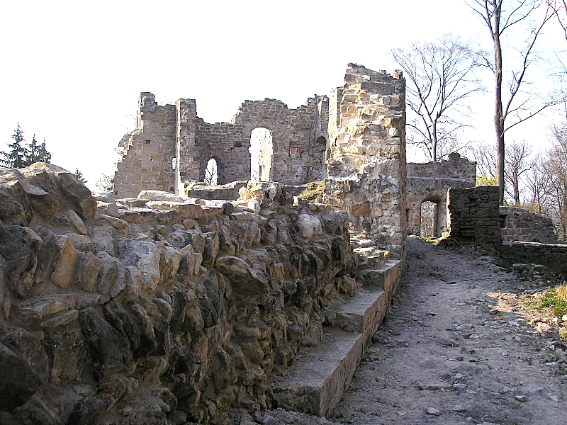 Burg Raueneck (Rauheneck) bei Ebern (Landkreis Haßberge, Unterfranken). Der Nordostteil der Burg. Eigene Aufnahme, Aug. 2007 / Raueneck (Rauheneck) castle near Ebern (Lower Franconia, Germany). The north eastern part of the castle. Own photo, Aug. 2007